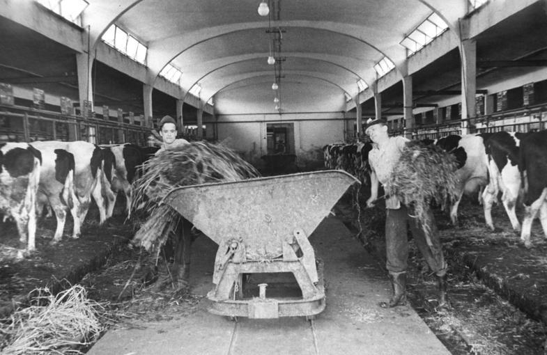 Hobrechtsfelde, Bauern beim Ausmisten Zentralbild M.Schmidt 29.5.1959 Volksgut Hobrechtsfelde bildet junge Menschen zu Facharbeitern aus Nach dem modernsten Erkentnissen in der Viehzucht werden auf dem Volksgut Hobrechtsfelde bei Berlin 40 Jungen und Mädel von erfahrenen Lehrausbildern zu Rinderzüchtern ausgebildet. Für die praktische Arbeit stehen den Lehrlingen ein modern eingerichteter Lehrstall sowie die neusten Maschinen und Geräte zur Verfügung. Die Lehrzeit beträgt drei Jahre, für Mittelschüler zwei Jahre. Alle Lehrlinge sind in den nett eingerichteten Räumen des Wohnheims untergebracht. UBz: Auch das gehört zum Lehrplan der zukünftigen Rinderzüchter. Rodegang Kroll (links) und Rudolf Schulz beim Entmisten des Rinderstalls.